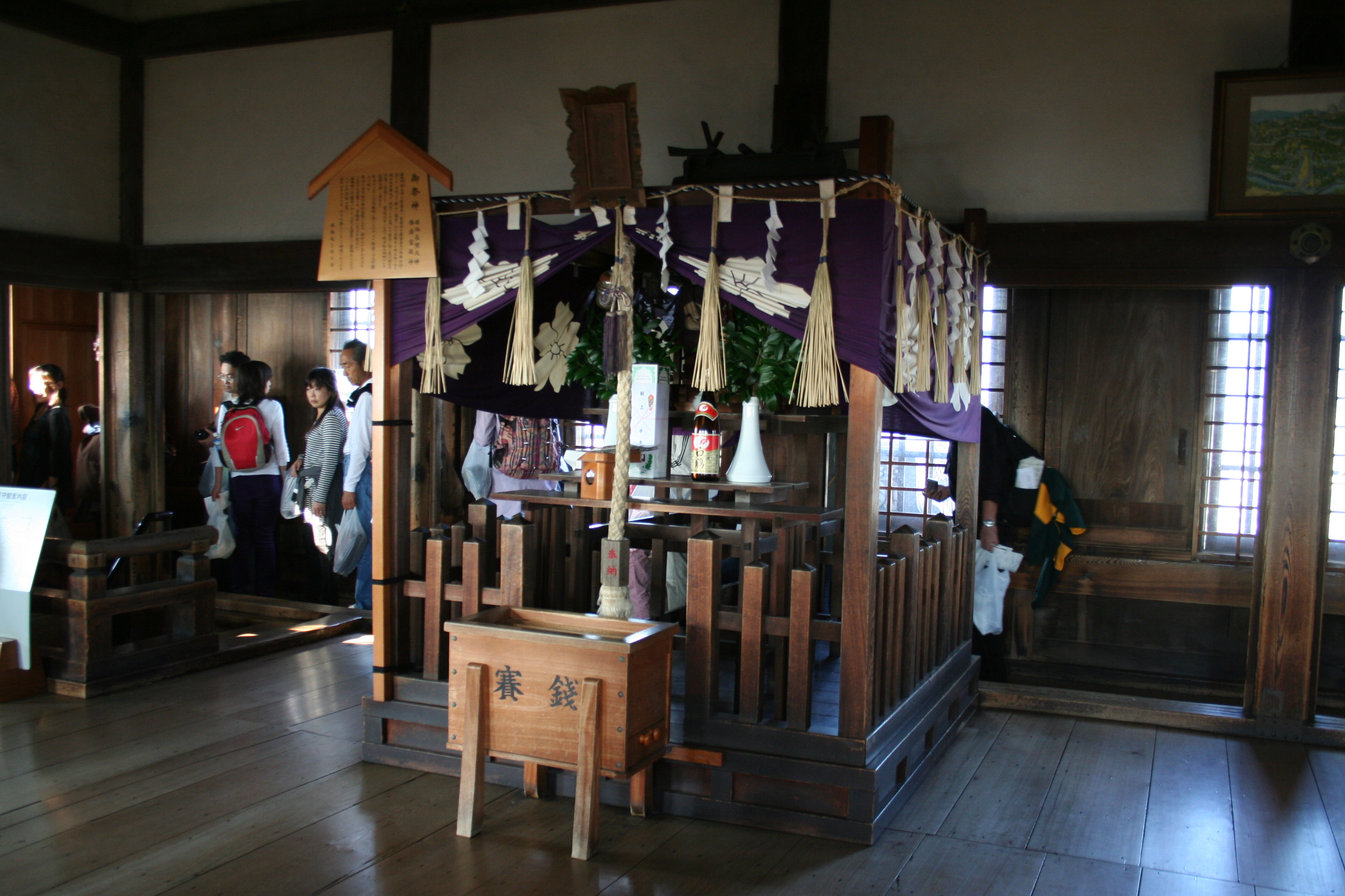 2009年秋の姫路城。 大天守6階にある刑部神社。